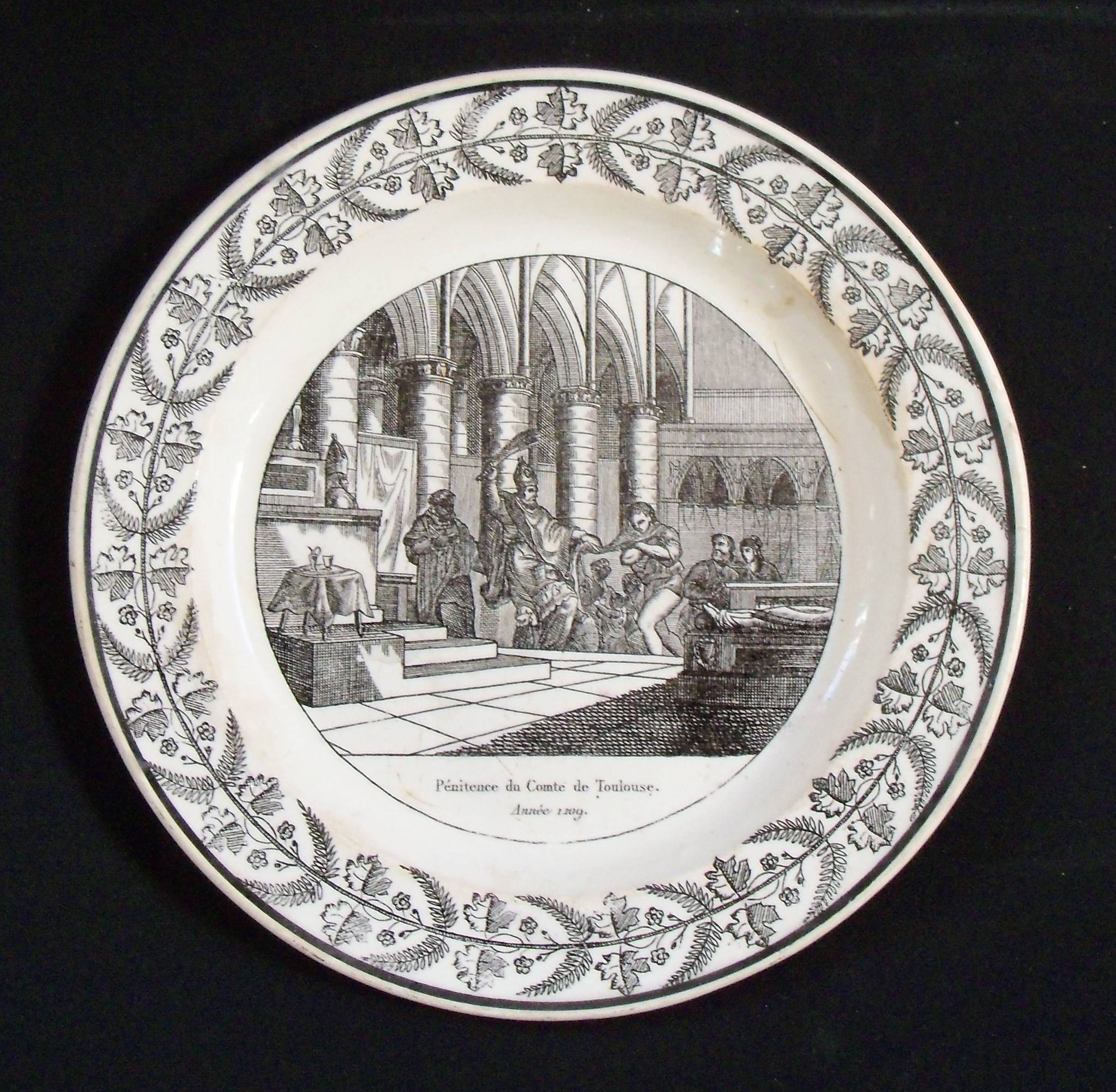 Assiette ancienne illustrant la pénitence du Comte de Toulouse en 1209. Au dos, gravé : LL&T (en dessous) MONT.. (Louis Lebeuf et Thibault 1825-1833, Creil et Montereau